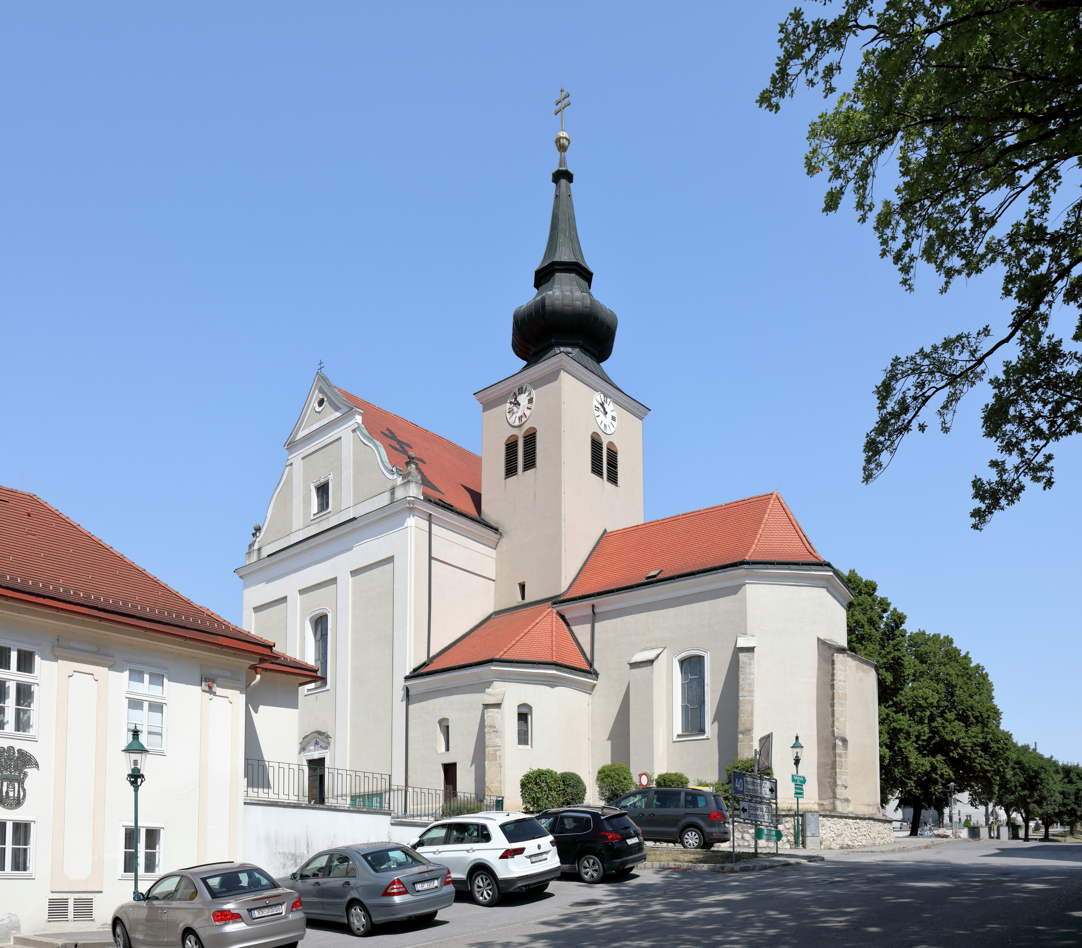 Südostansicht der röm.-kath. Pfarrkirche hl. Martin in der niederösterreichischen Marktgemeinde Ernstbrunn. Die hochbarocke Saalkirche wurde um die 17./18. Jahrhundertwende errichtet, wobei der im rechten Winkel herausragende gotische Chor, der Turm und die Seitenkapelle der geosteten Vorgängerkirche miteinbezogen wurde.